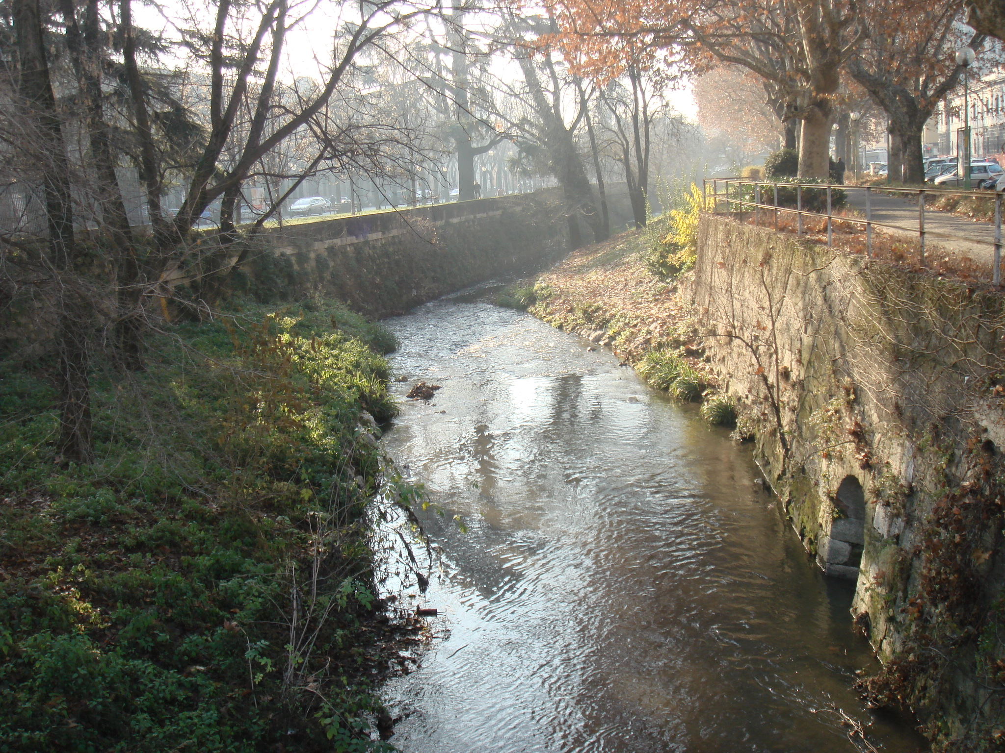 Il Torrente Garza. Vista da via Tartaglia (Brescia).